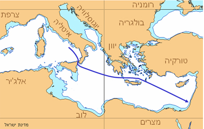 "מסלול השיט של אוניית המעפילים "מדינת ישראל